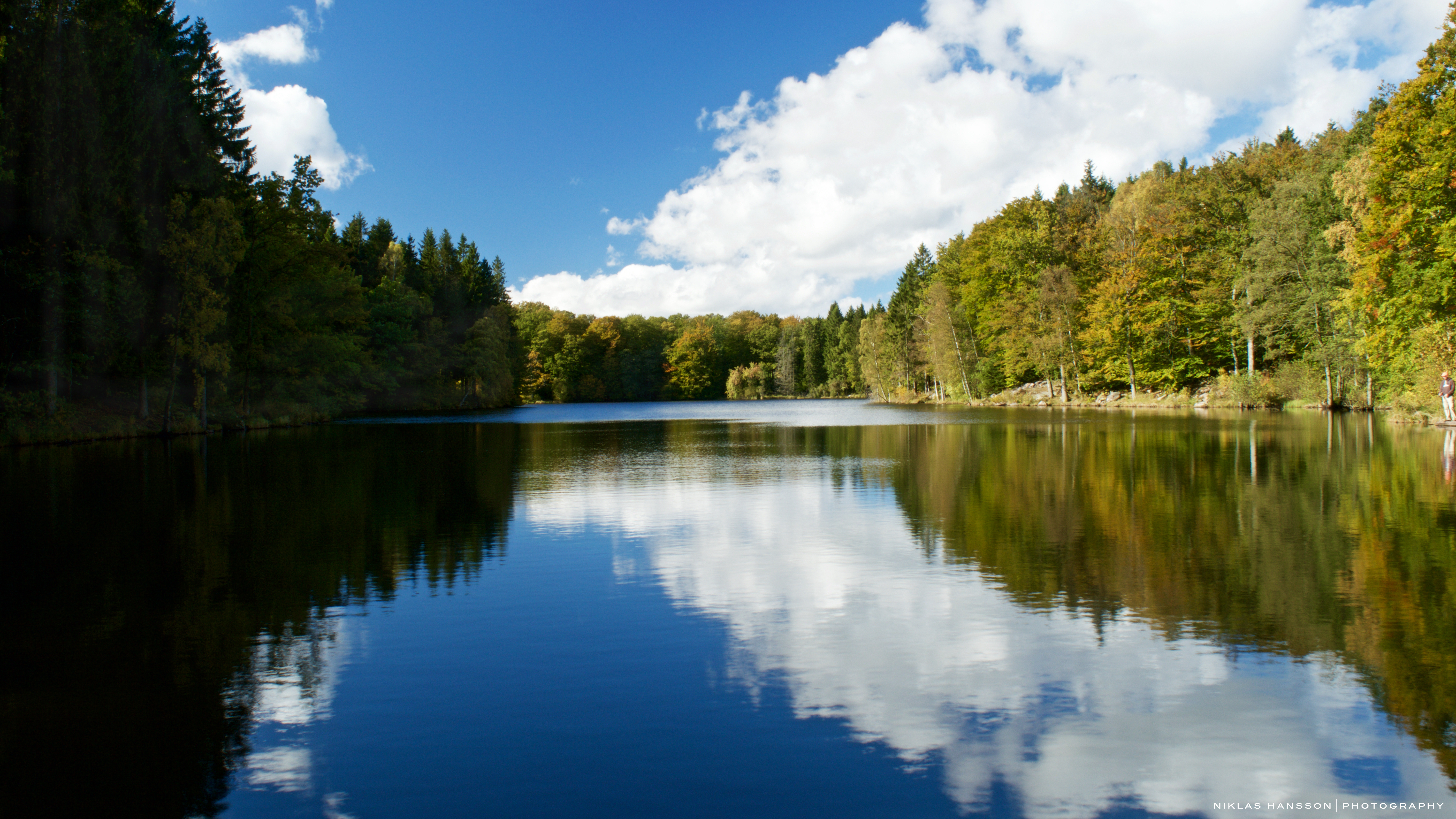 Sjön i Klåveröds strövområde, Skåne